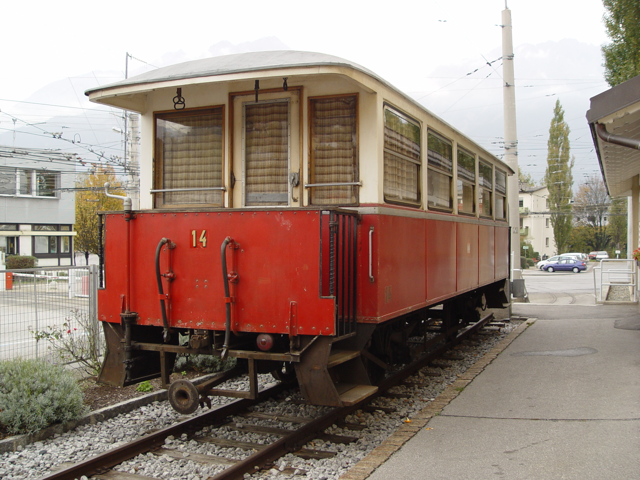 Beiwagen 14 der Stubaitalbahn am Museumsbahnsteig der Tiroler Museumsbahnen